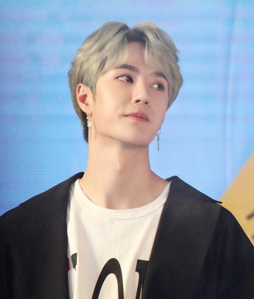 2018 王一博 (UNIQ成员)